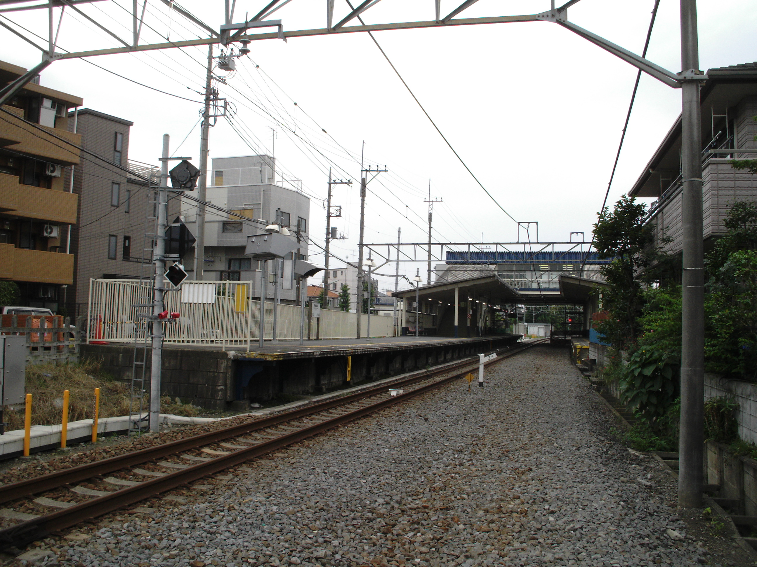 競艇場前駅